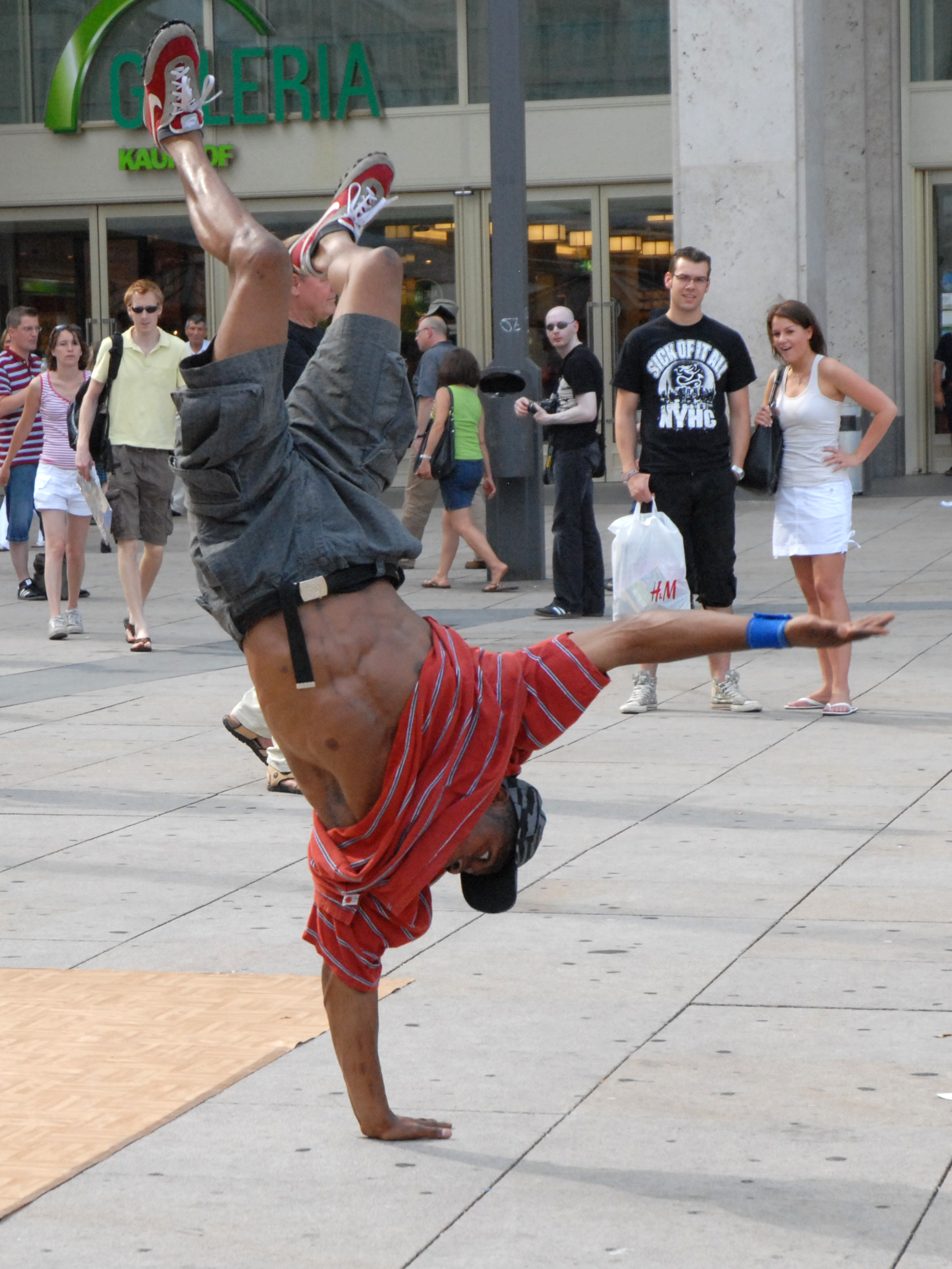 Danseur de Hip Hop sur l'Alexander Platz (Berlin)